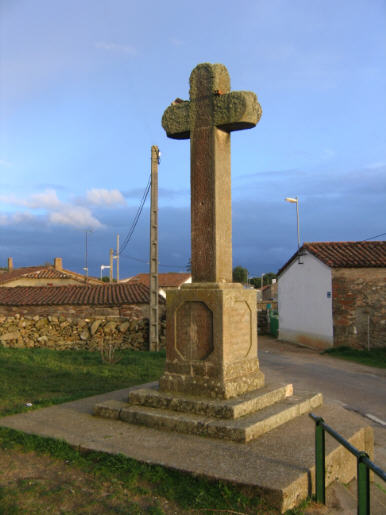 Cruz junto a la Iglesia